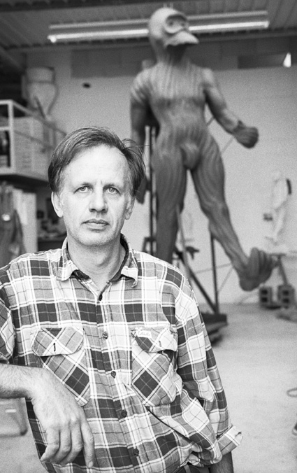 Luk Van Soom